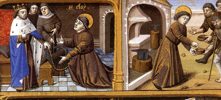 Saint Eloi remet deux trônes dorés à Clotaire II et saint Eloi maréchal-ferrant. XVème siècle.